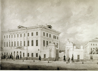 Институт русского языка, старинном доме на Волхонке